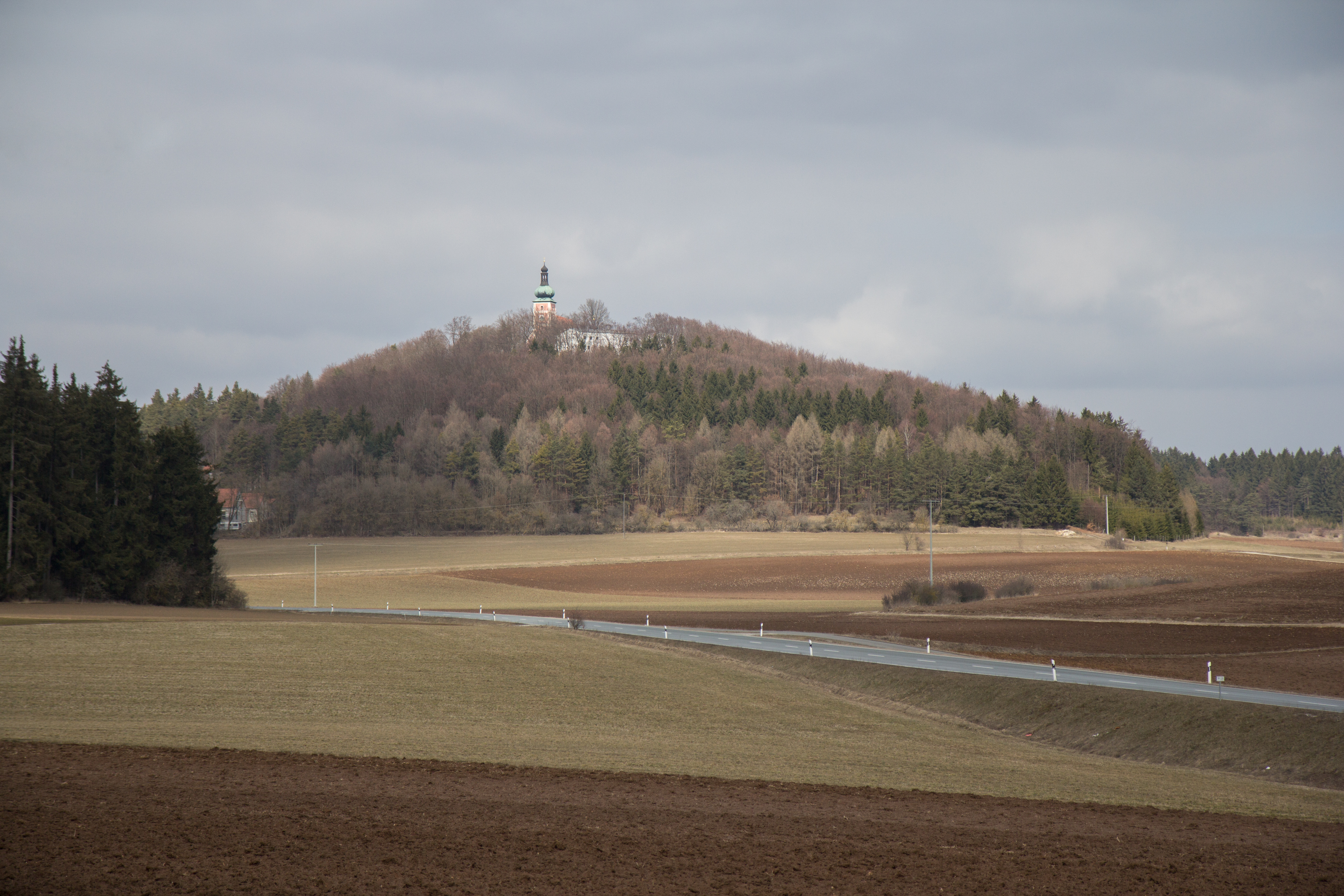 Ansicht des Habsberges mit der Wallfahrtskirche und dem überbauten Burgstall